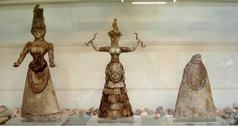 Museu arqueològic de Creta a Heràkleion